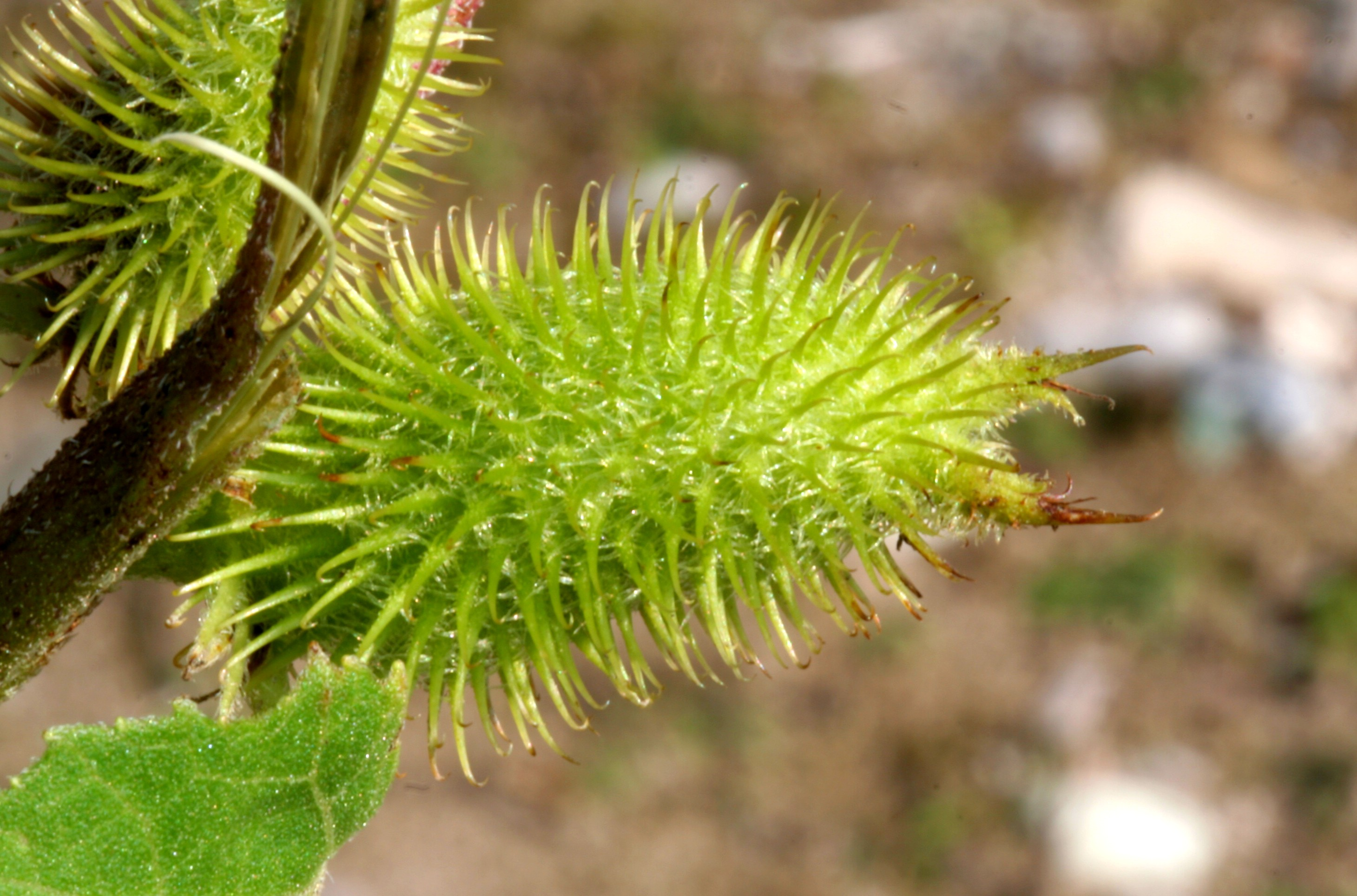 Nappola italiana Località: Praloran, Limana (BL), 319 m s.l.m.